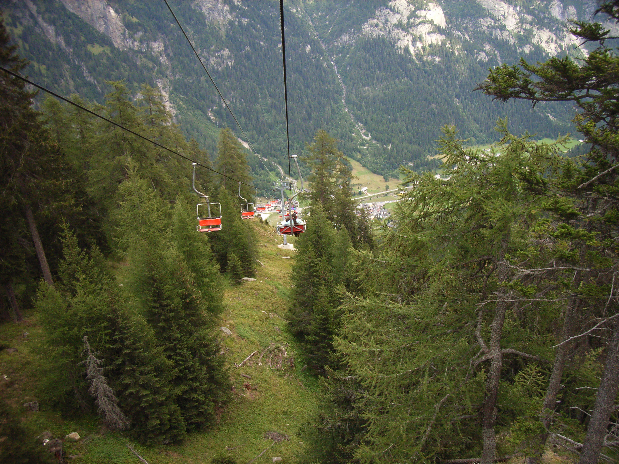 Vista di una seggiovia in Val Formazza, Italia.